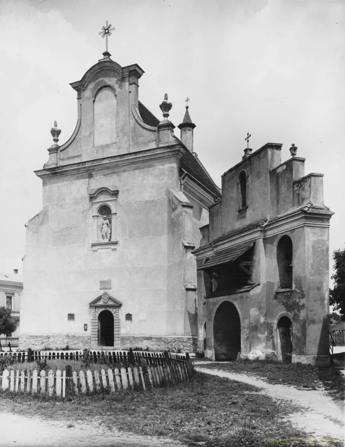 Костел та дзвіниця, Городок Галицький,1912.